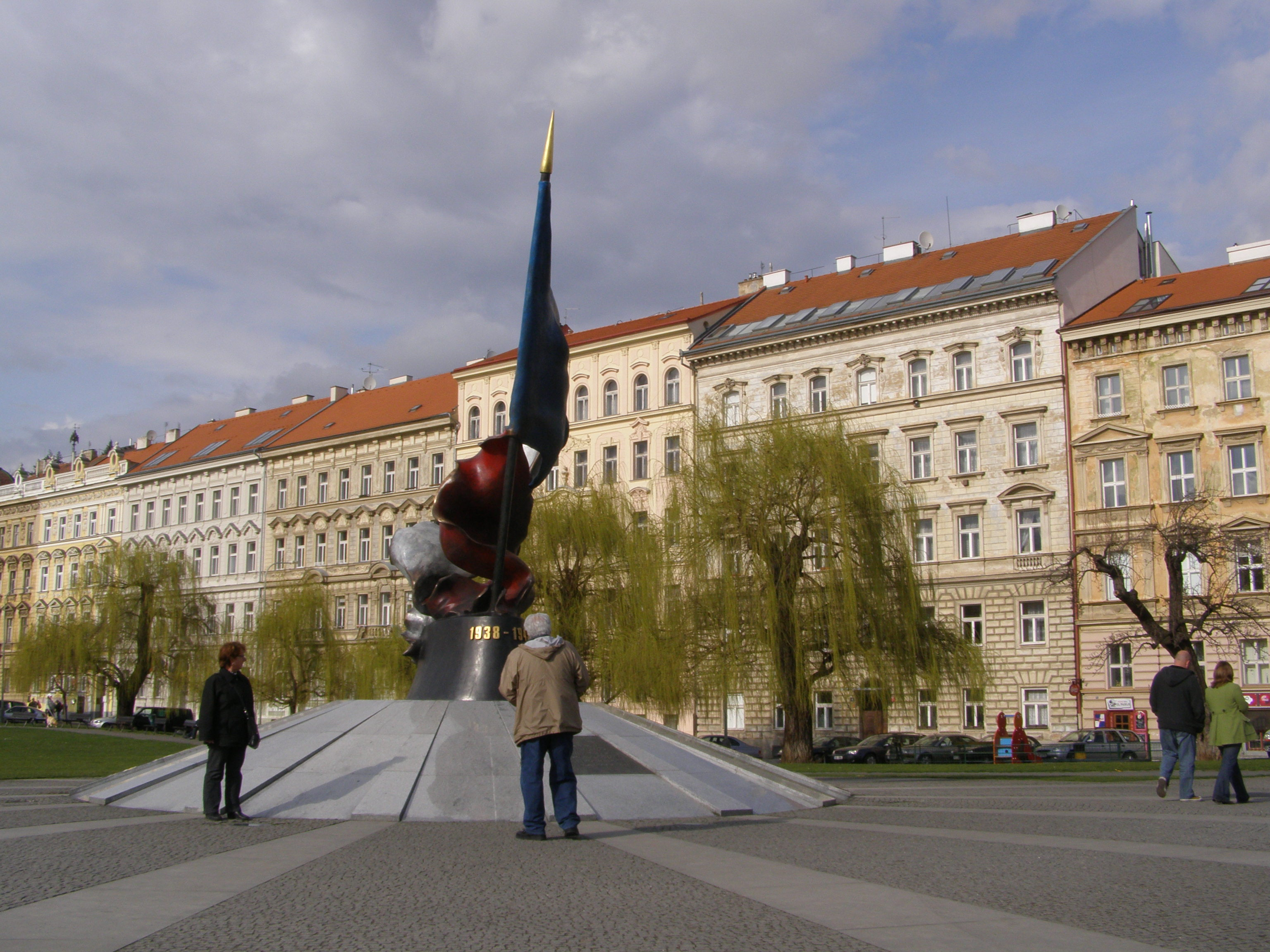 Praha, Malá Strana, ulice Klárov, památník druhého odboje, v pozadí ulice U Železné lávky